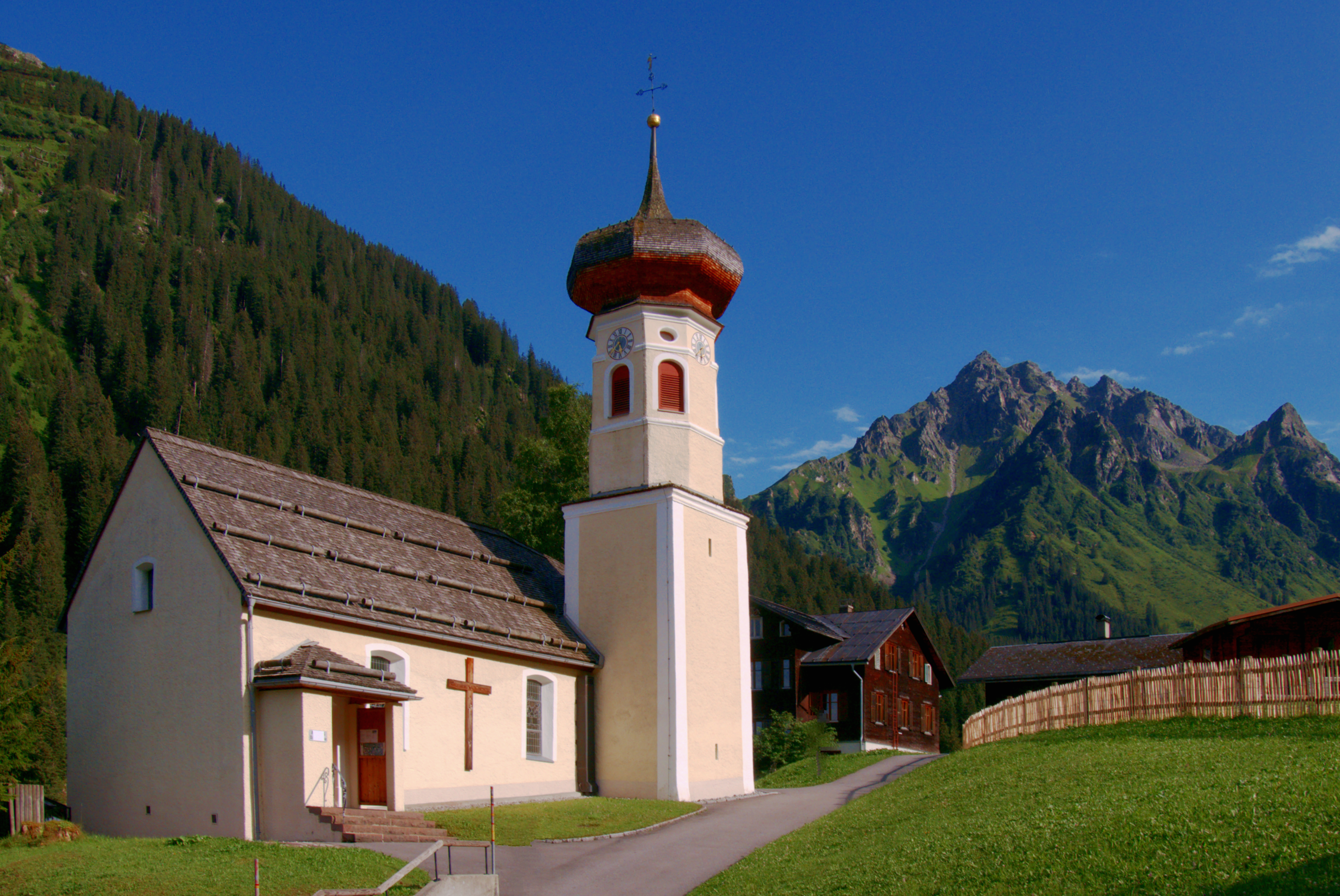 Kuratiekirche St. Maria Magdalena (Gargellen) von aussen (von Nordosten) mit Ritzenspitzen im Hintergrund